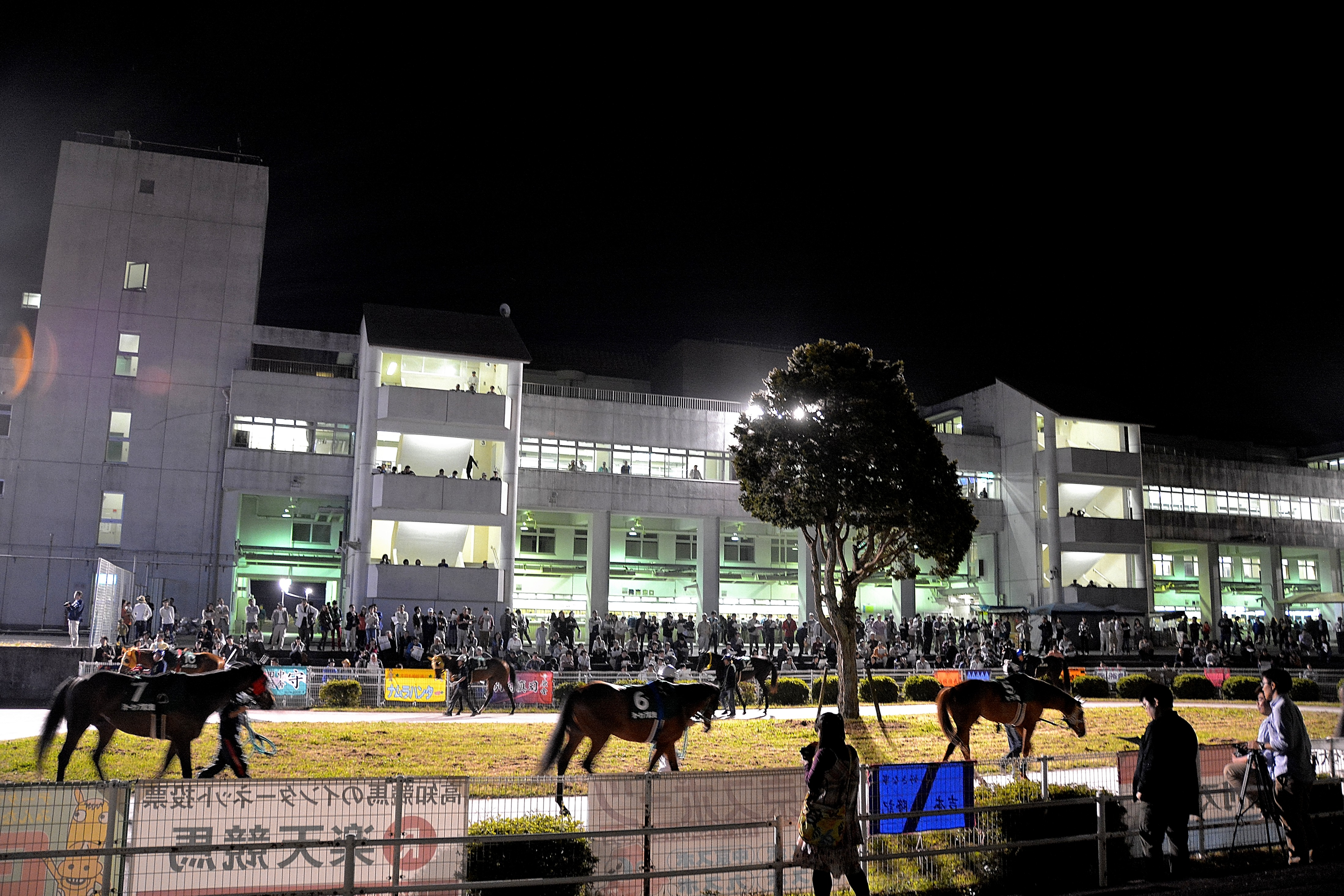 2015年4月29日に高知競馬場の第10競走で行われた「ジョッキーズバトル 洋一カップ」第2戦パドックの状況を、観客席から撮影。